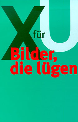 Poster und Buchtitel von X für U – Bilder, die lügen